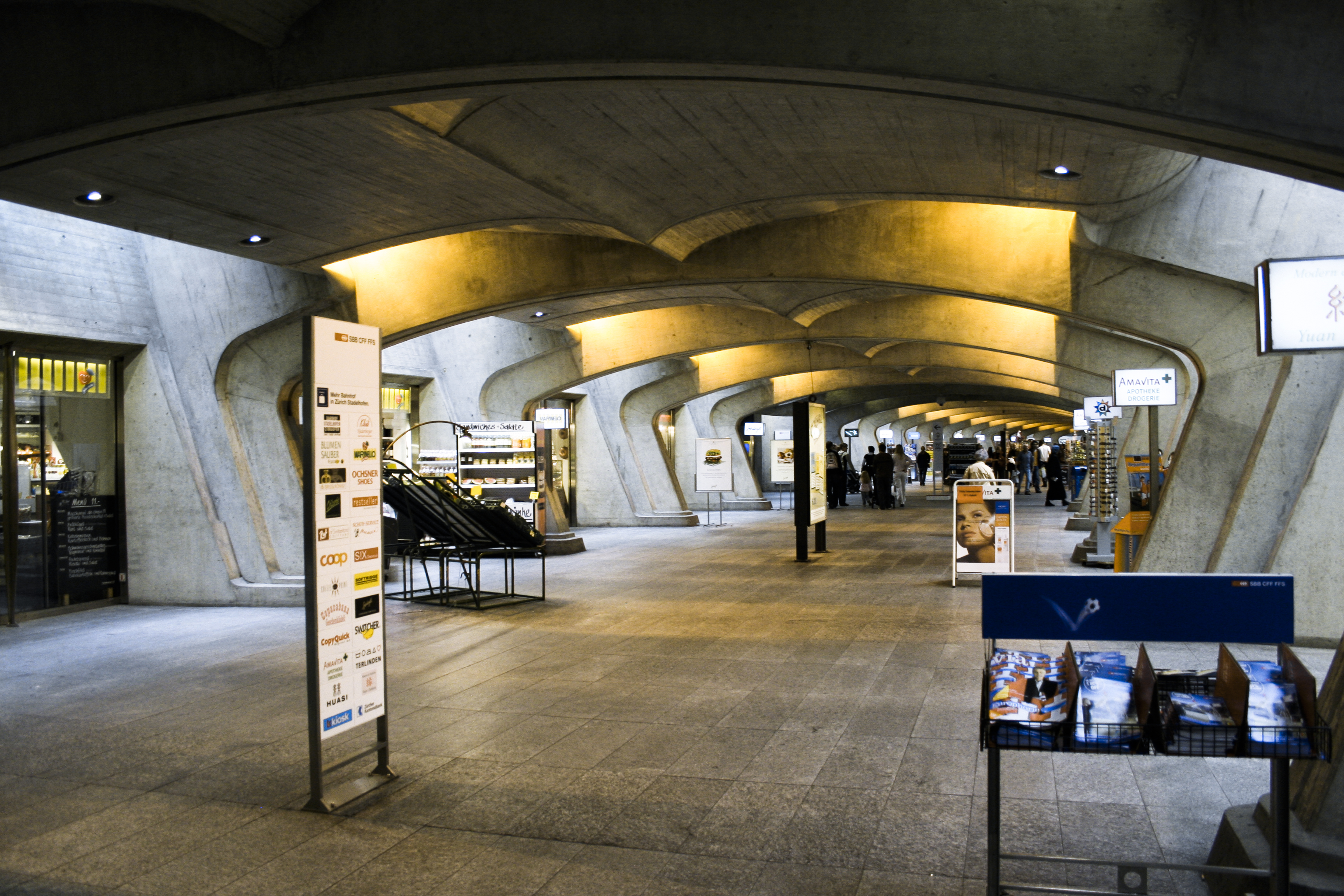 Stadelhofen Train Station in Zürich, Switzerland. Designed by Santiago Calatrava